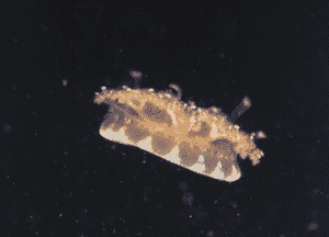 MEDUSA INVERTIDA( CASSIOPEIDA XAMACHANA)